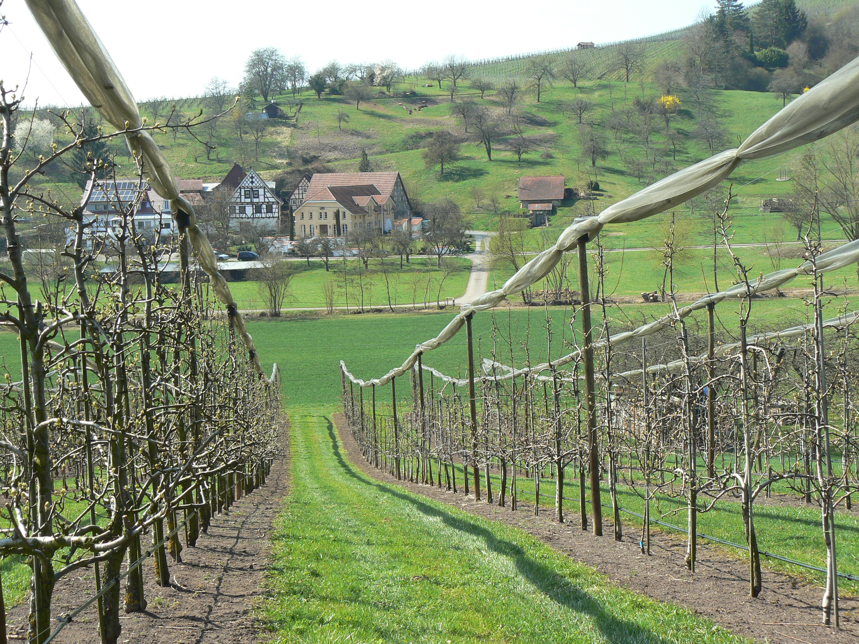 (LSG:BW-1.19.052)_Unteres Gundelsbacher Tal